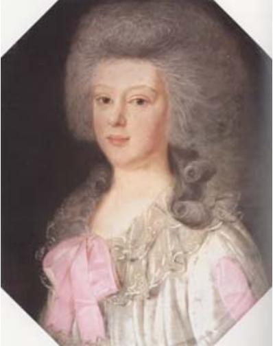 Мария Денисовна Давыдова, в первом браке была за Михаилом Каховским, во втором за Петром Алексеевичем Ермоловым (1746-1832). Её сын А. П. Ермолов, известный военачальник, главнокомандующий на первом этапе Кавказской войны.